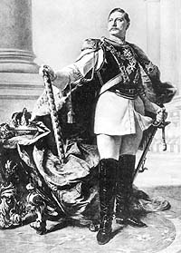 Guglielmo II di Germania - stampa (immagine tratta da wiki inglese)